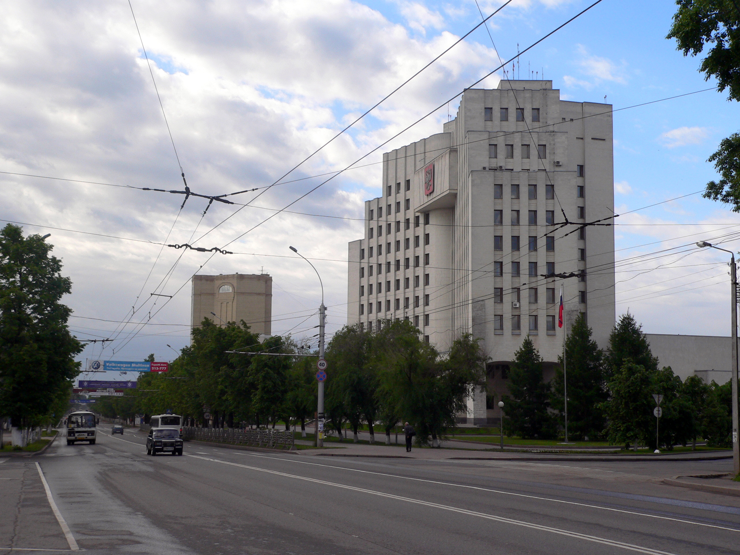 Начало улицы Герцена. Вид с улицы Марии Ульяновой на Правительство Вологодской области.